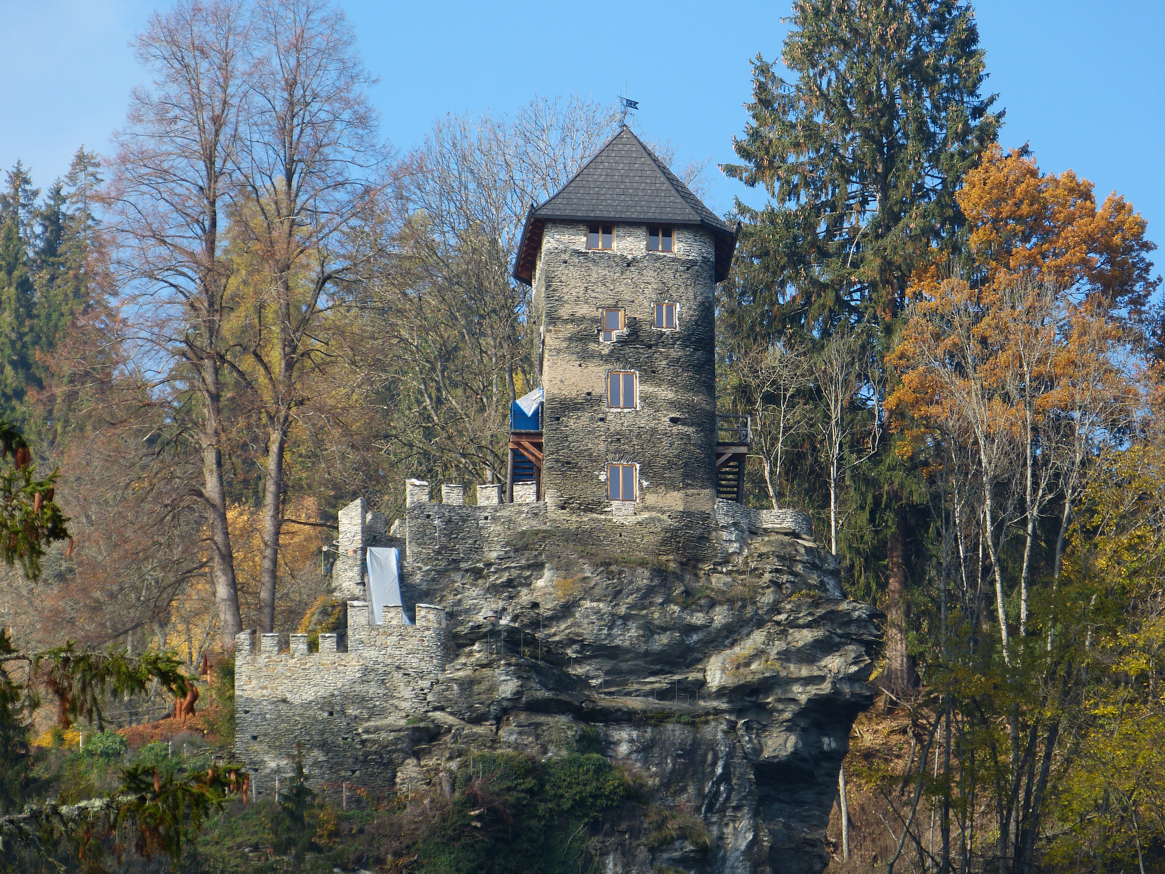 Vorwerkturm (11./12. Jhdt.; restauriert 21. Jhdt.) bei Burgruine Hochkraig